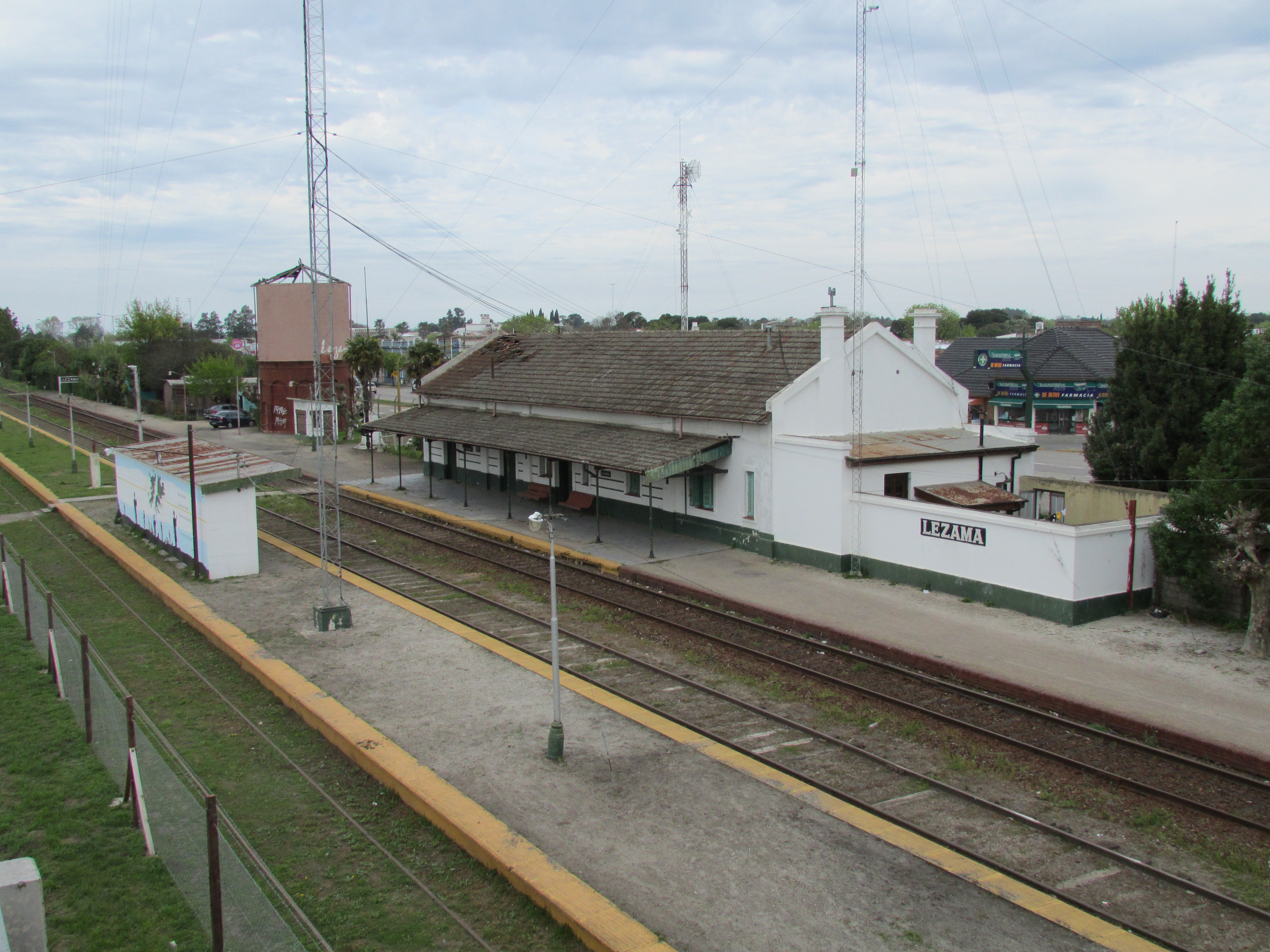 Estación Lezama del Ferrocarril General Roca en la localidad del mismo nombre, provincia de Buenos Aires, Argentina.